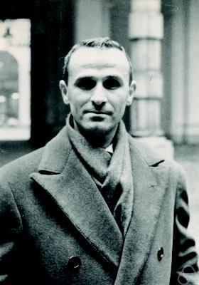 Foto di Ermanno Marchionna